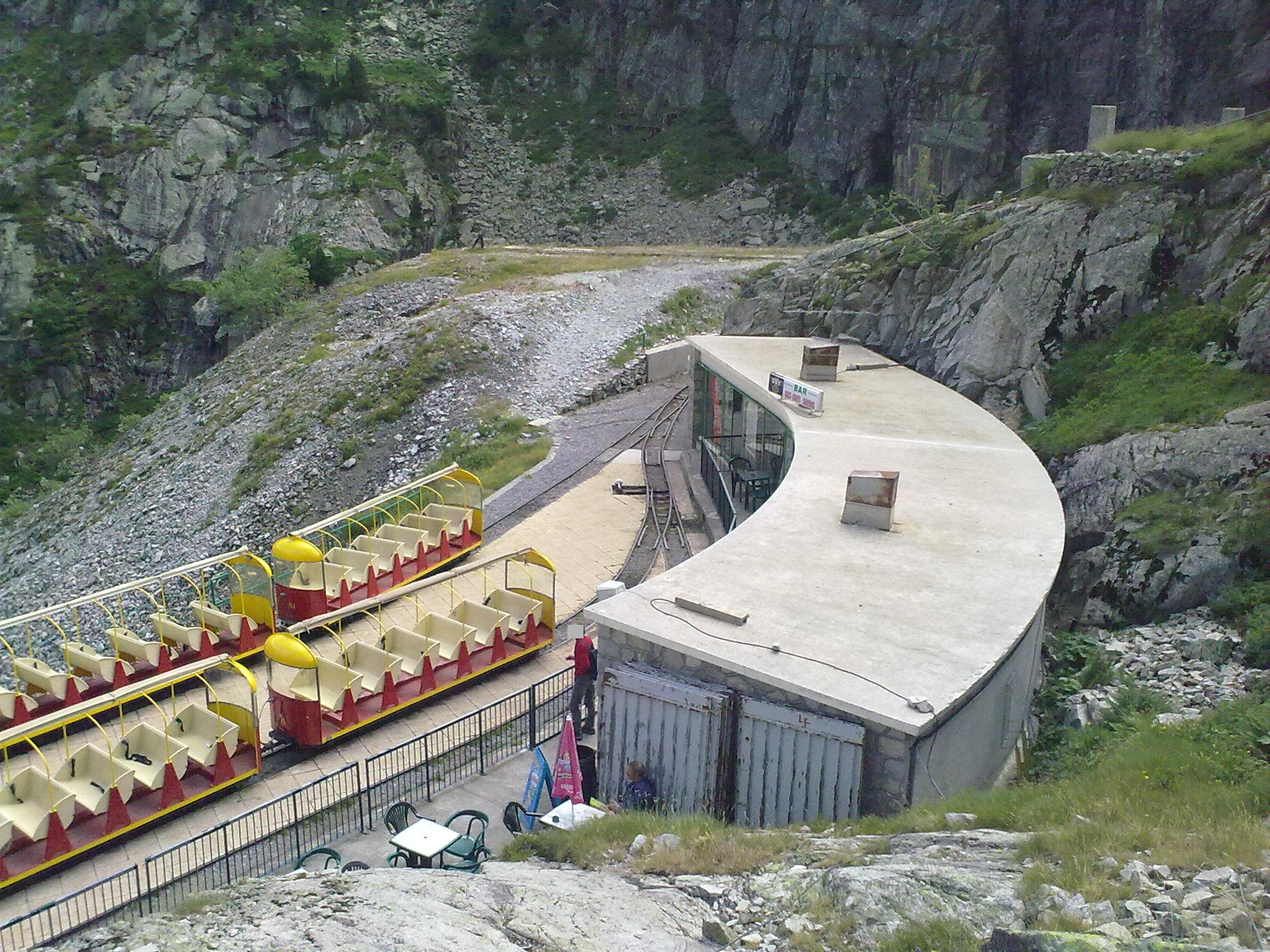 Le petit train d'Artouste le 25 juillet 2010.